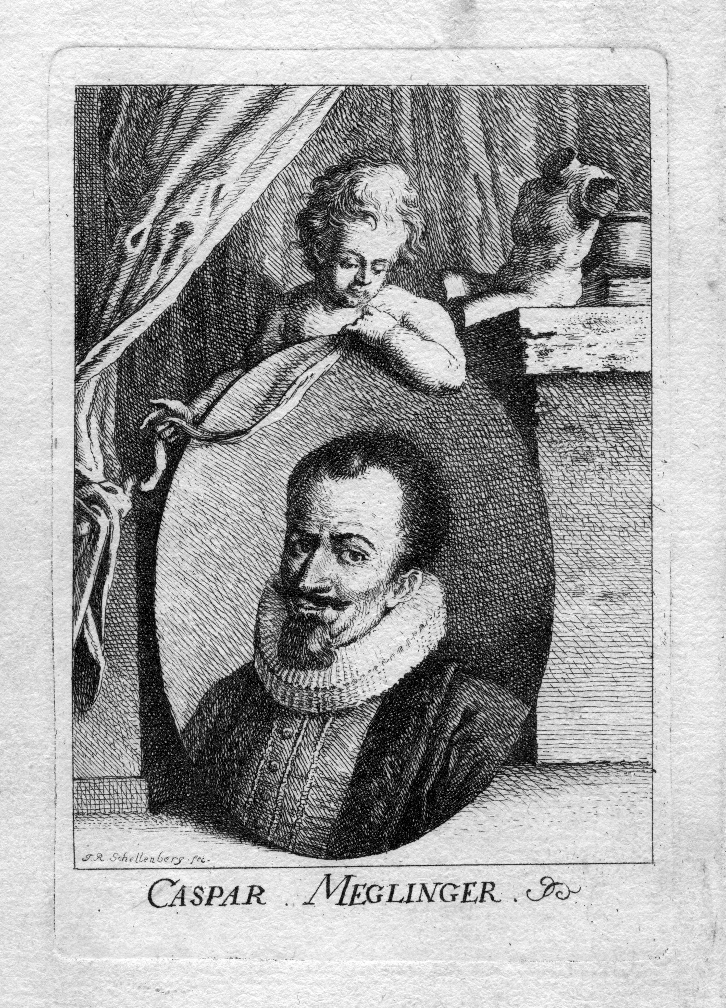 portrait gravé de Kaspar Meglinger